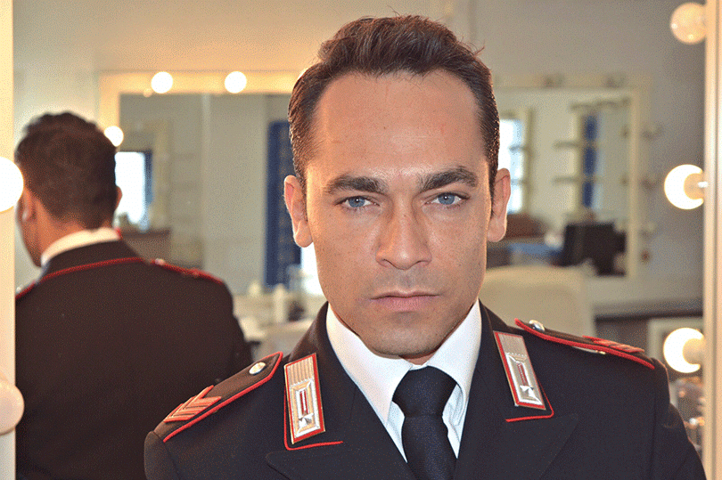 Francesco Castiglione alias Barba